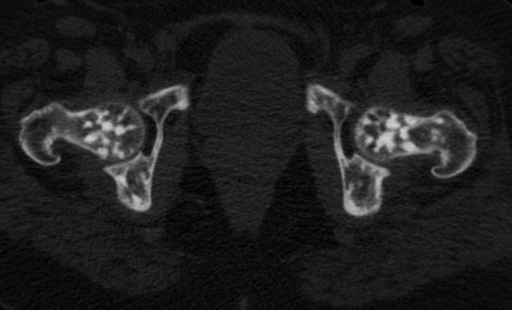 Osteopoikilóza kyčelního kloubu